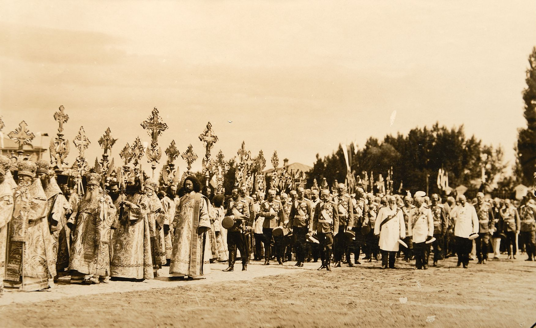 Хресна хода приурочена до 200-т річчя перемоги в Полтавській битві (Полтава 27 червня 1909)